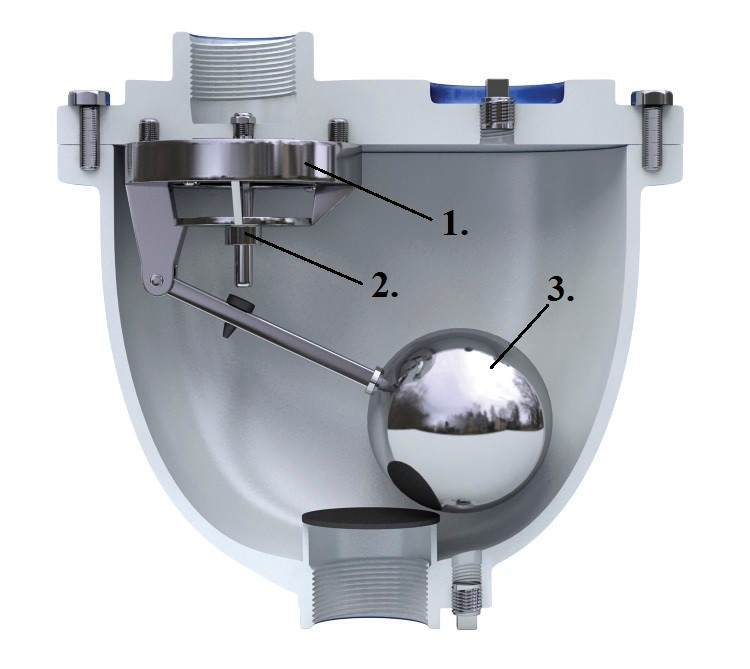 Orlaidžio pjūvis. 1. Didelė oro išleidimo/įleidimo anga; 2. Maža oro išleidimo anga; 3. Vožtuvas (plūdė)